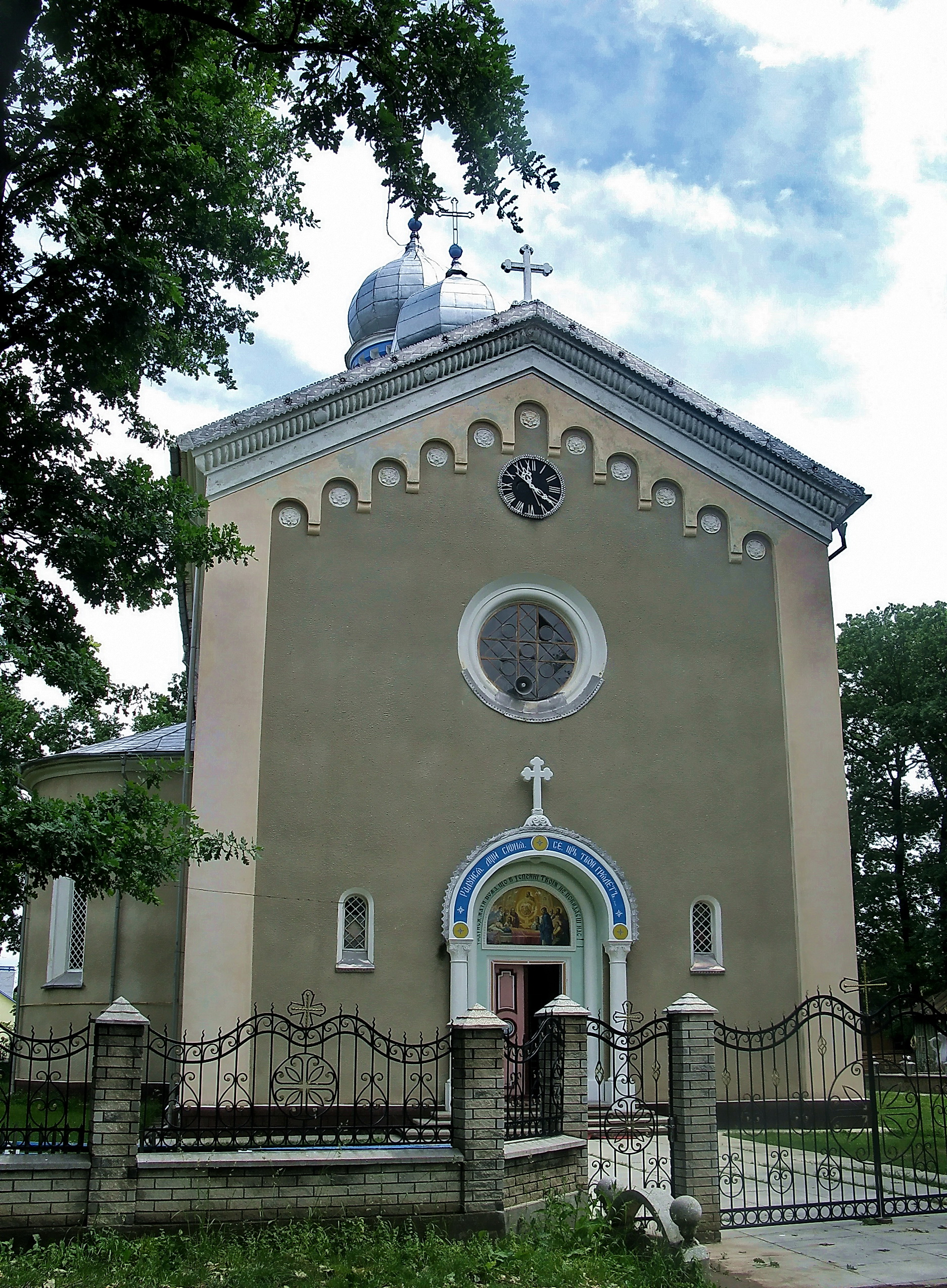 Успенська церква (мур.), с. Банилів